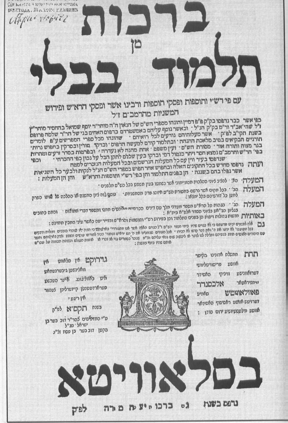 צילום עמוד השער מתוך תלמוד בבלי מסכת ברכות דפוס סלוויטא ה'תקס"א"